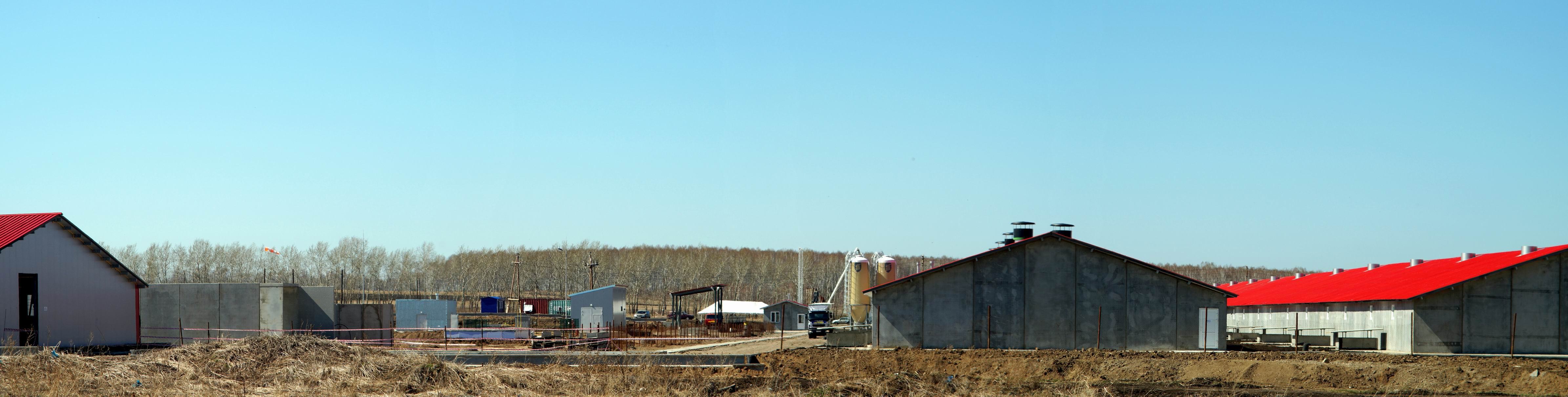 Строющийся свинокомплекс.Подсопки.